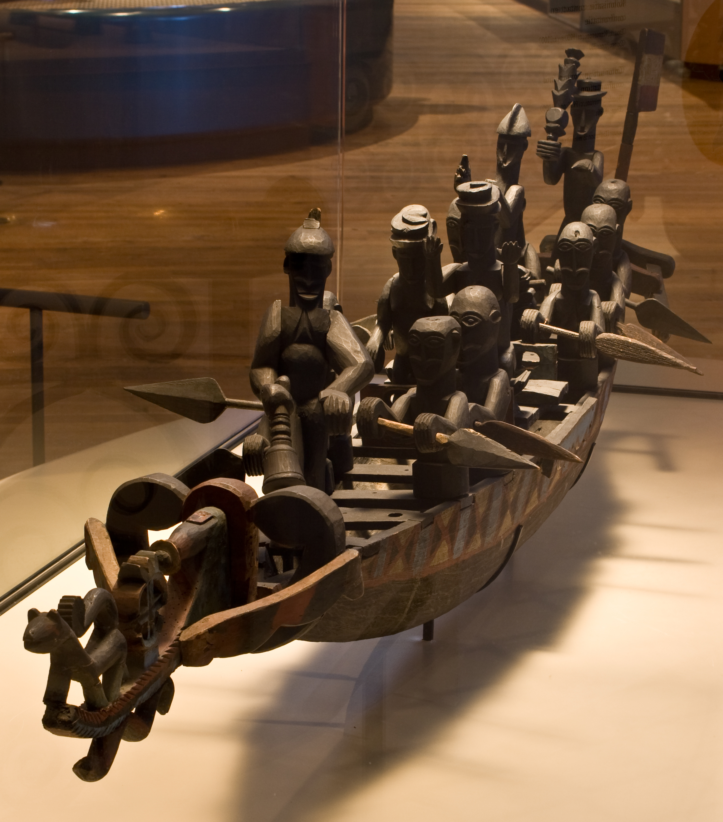 Kano (6153-1, 6153- 2) Tropenmuseum - Kano